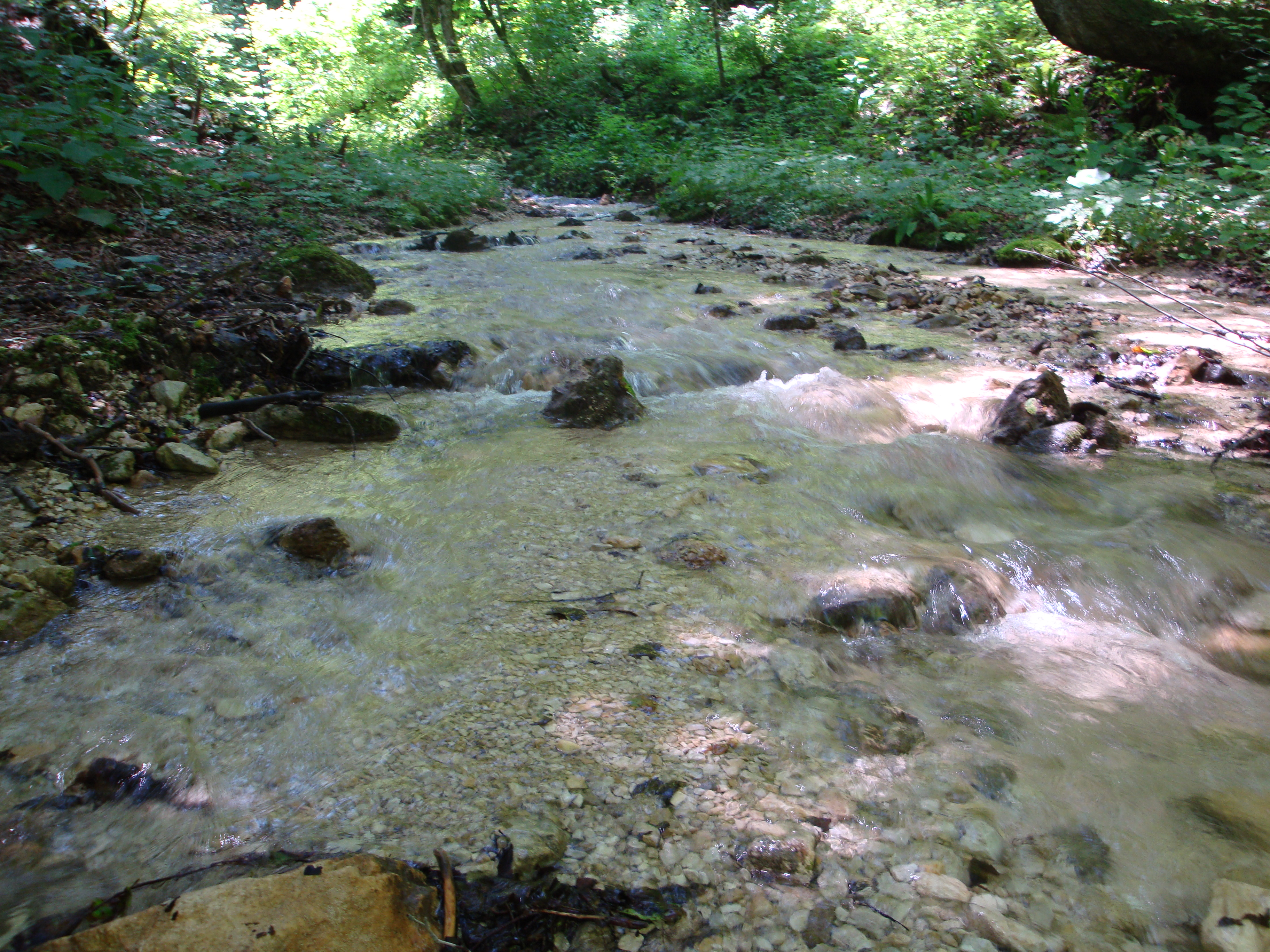 Potok Pendirjevka pri Minutniku Gorjanci.